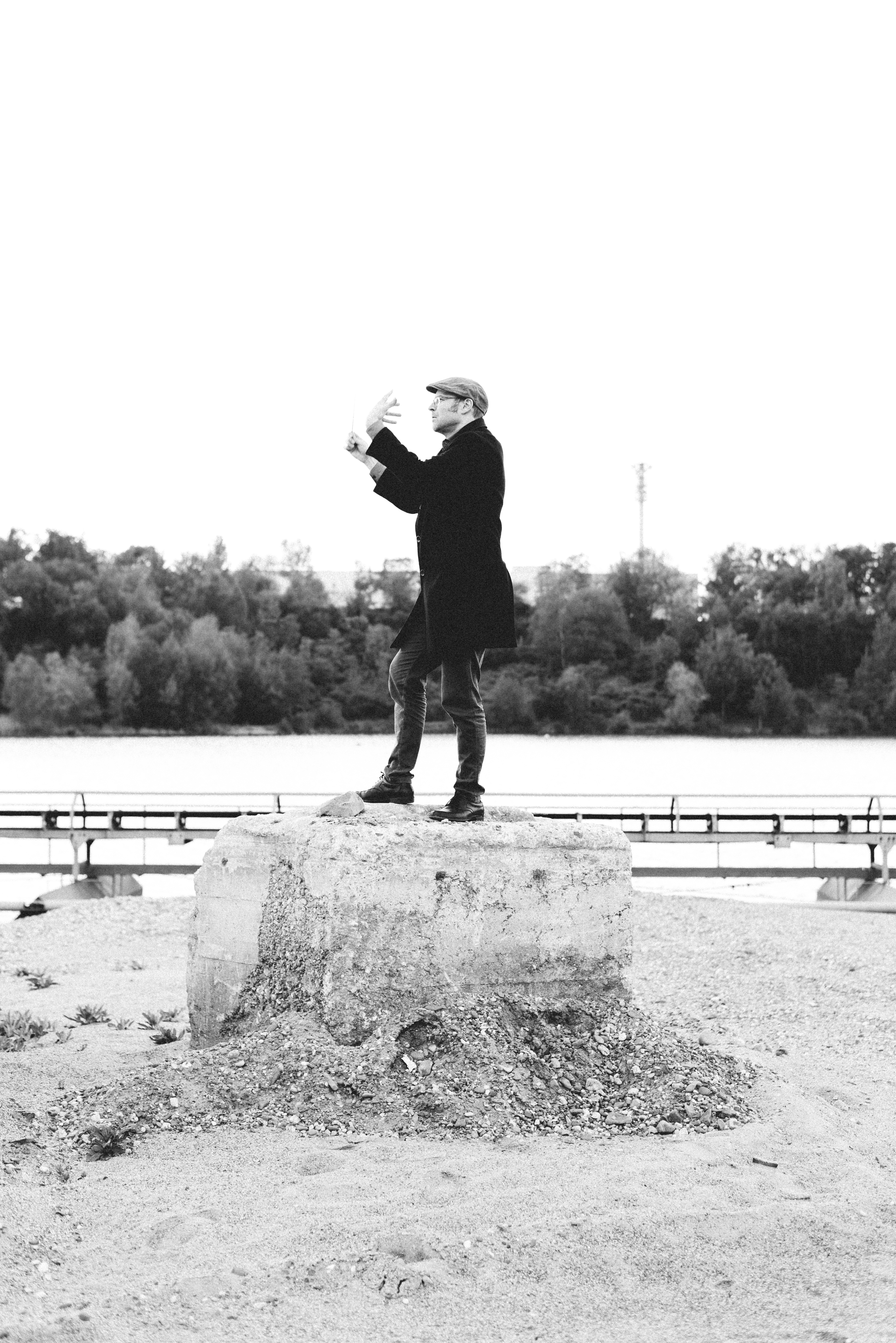 Christoph Maria Wagner // Foto: Martin Gendig